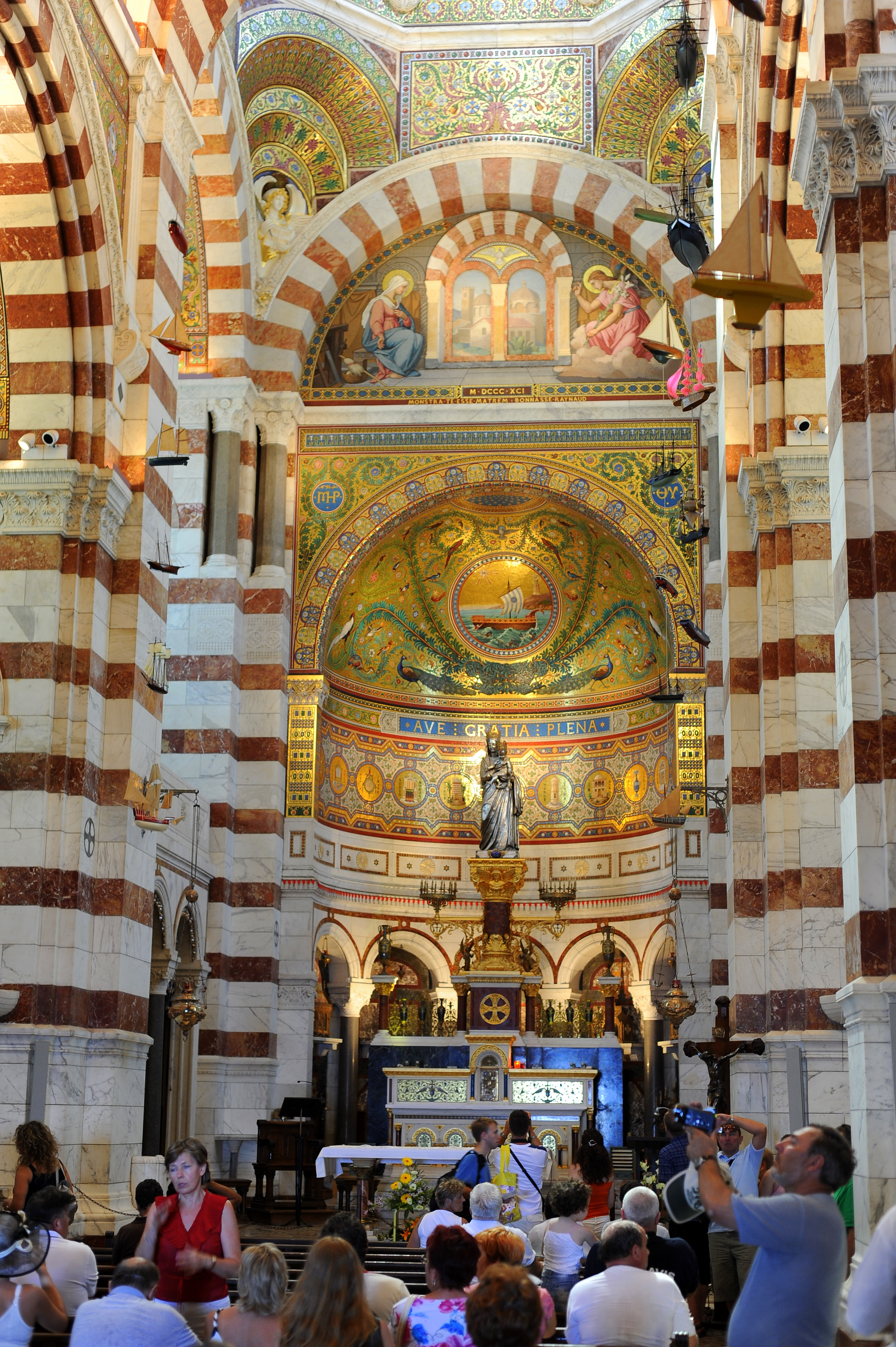 Wnętrze bazyliki Notre-Dame de la Garde w Marsylii